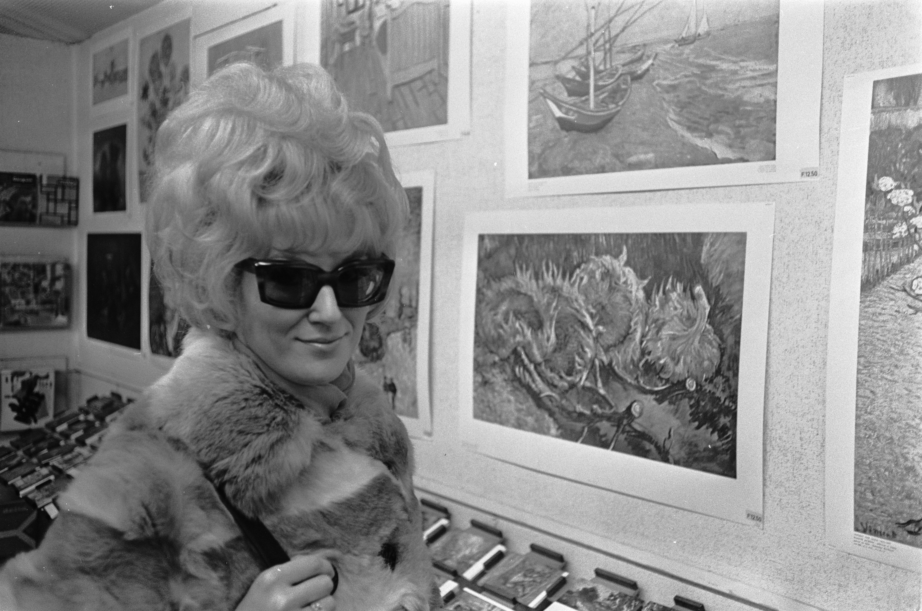 Collectie / Archief : Fotocollectie Anefo Reportage / Serie : Grand Gala du Disque 1968 Beschrijving : Dusty Springfield niet op Grand Gala du Disque. Hier tijdens een bezoek in het Stedelijk Museum Datum : 8 maart 1968 Locatie : Amsterdam Trefwoorden : bezoeken, musea, zonnebrillen Persoonsnaam : Springfield, Dusty Fotograaf : Fotograaf Onbekend / Anefo Auteursrechthebbende : Nationaal Archief Materiaalsoort : Negatief (zwart/wit) Nummer archiefinventaris : bekijk toegang 2.24.01.05 Bestanddeelnummer : 921-1468